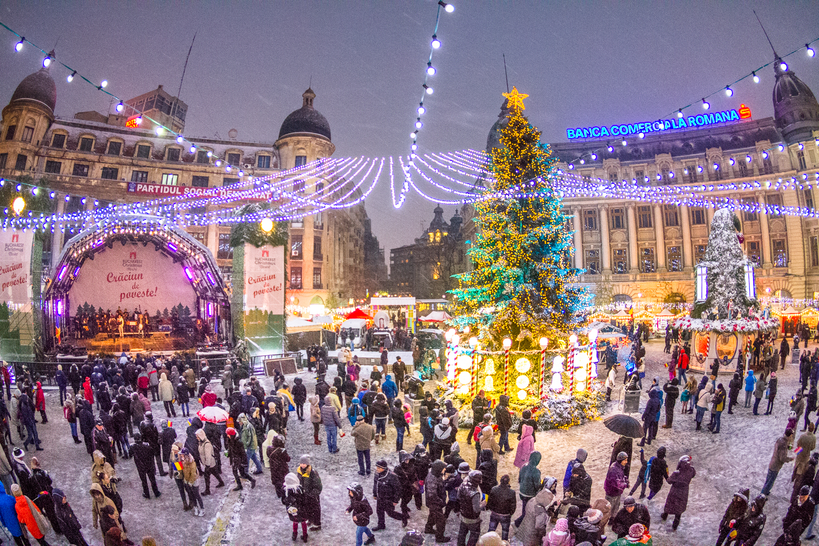 Piata Universitatii - Targ de Craciun 2014